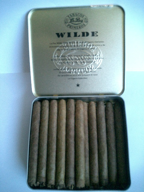 Boite de cigare La Paz ouvert (en France)